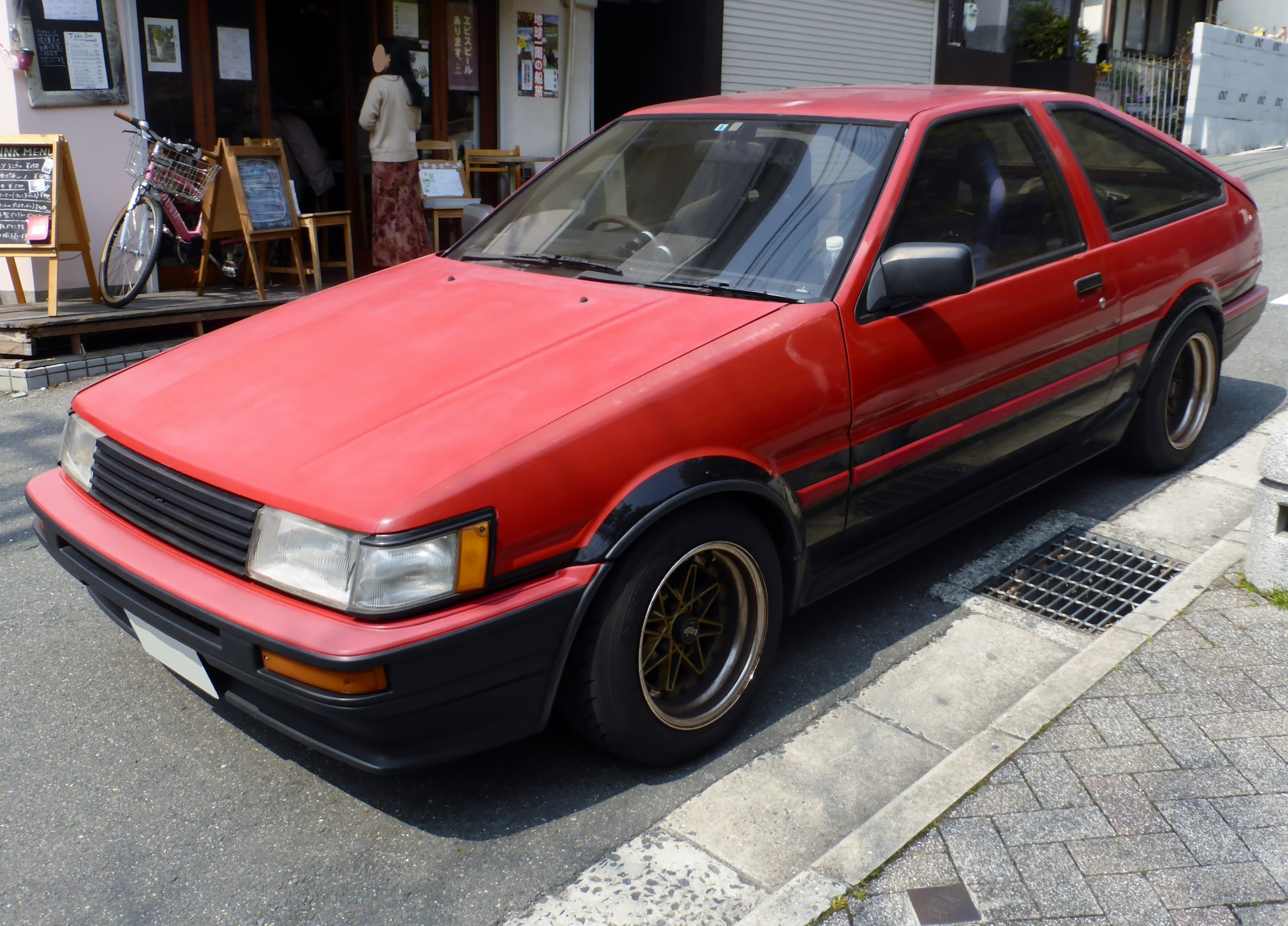 E-AE86-ECMVF後期型トヨタ・カローラレビンGT APEXをフロントから撮影。